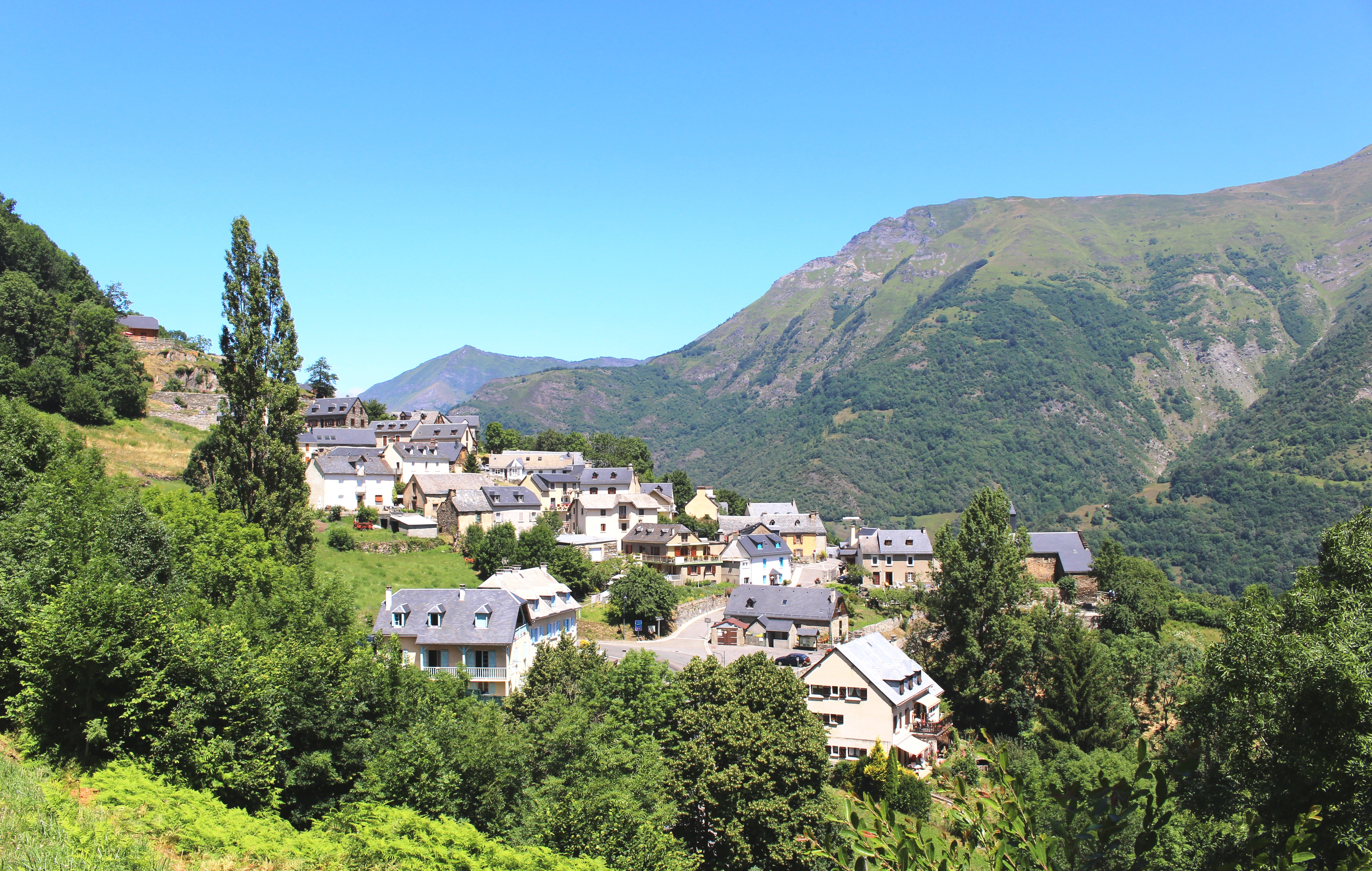 Grust (Hautes-Pyrénées)